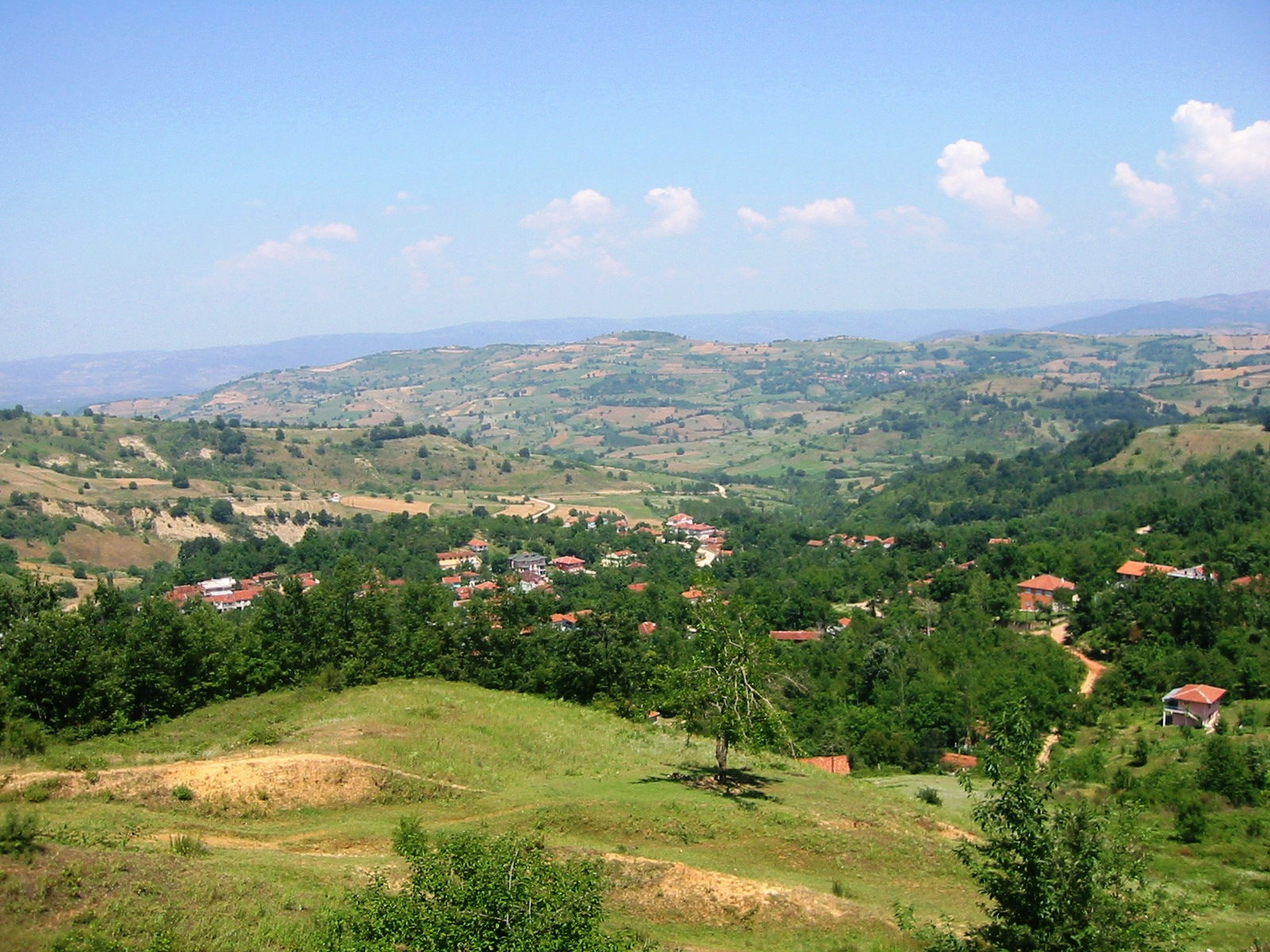 View of Hayriye, Bursa-Inegöl